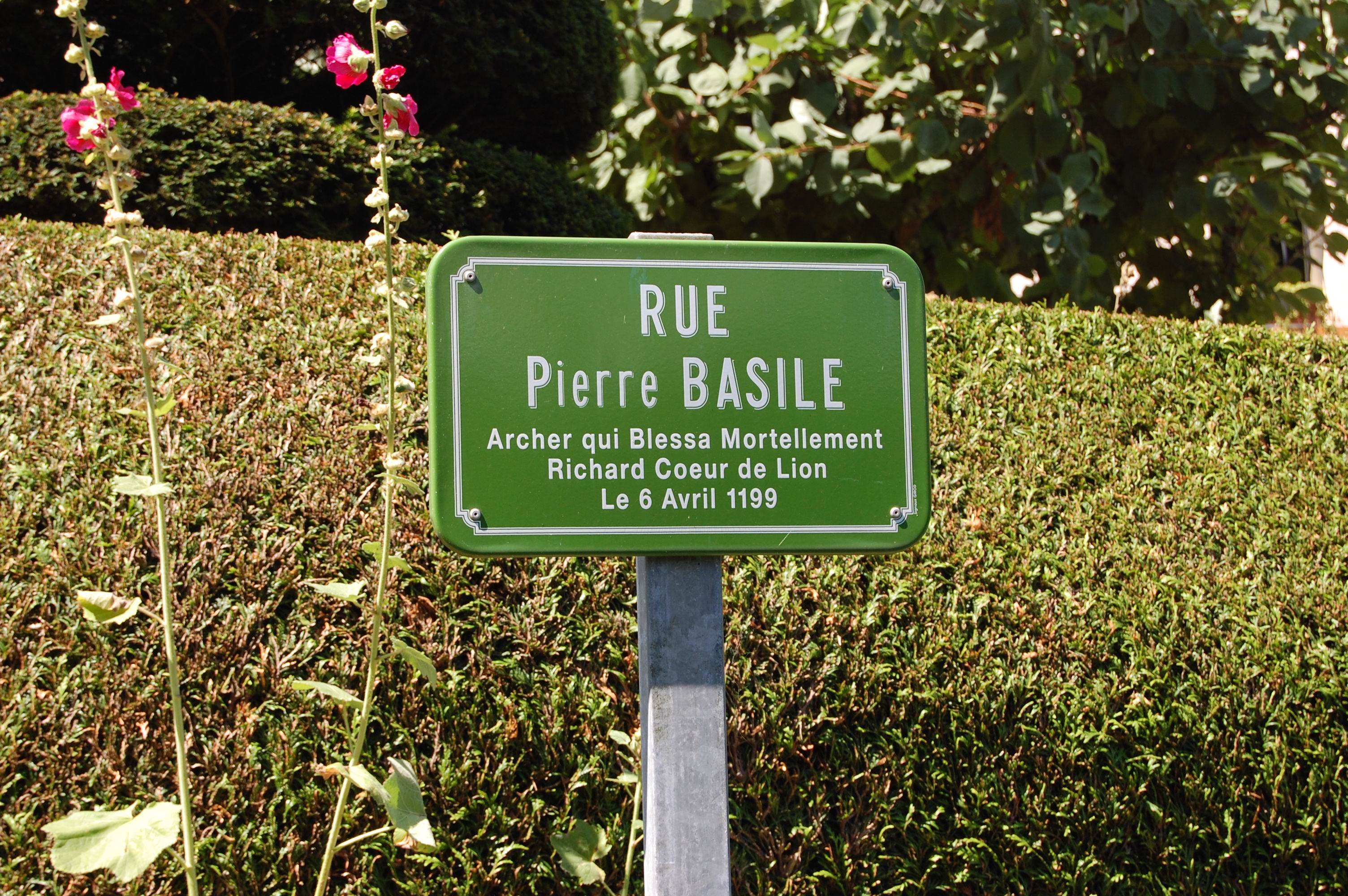 panneau de la rue Pierre Basile à Châlus